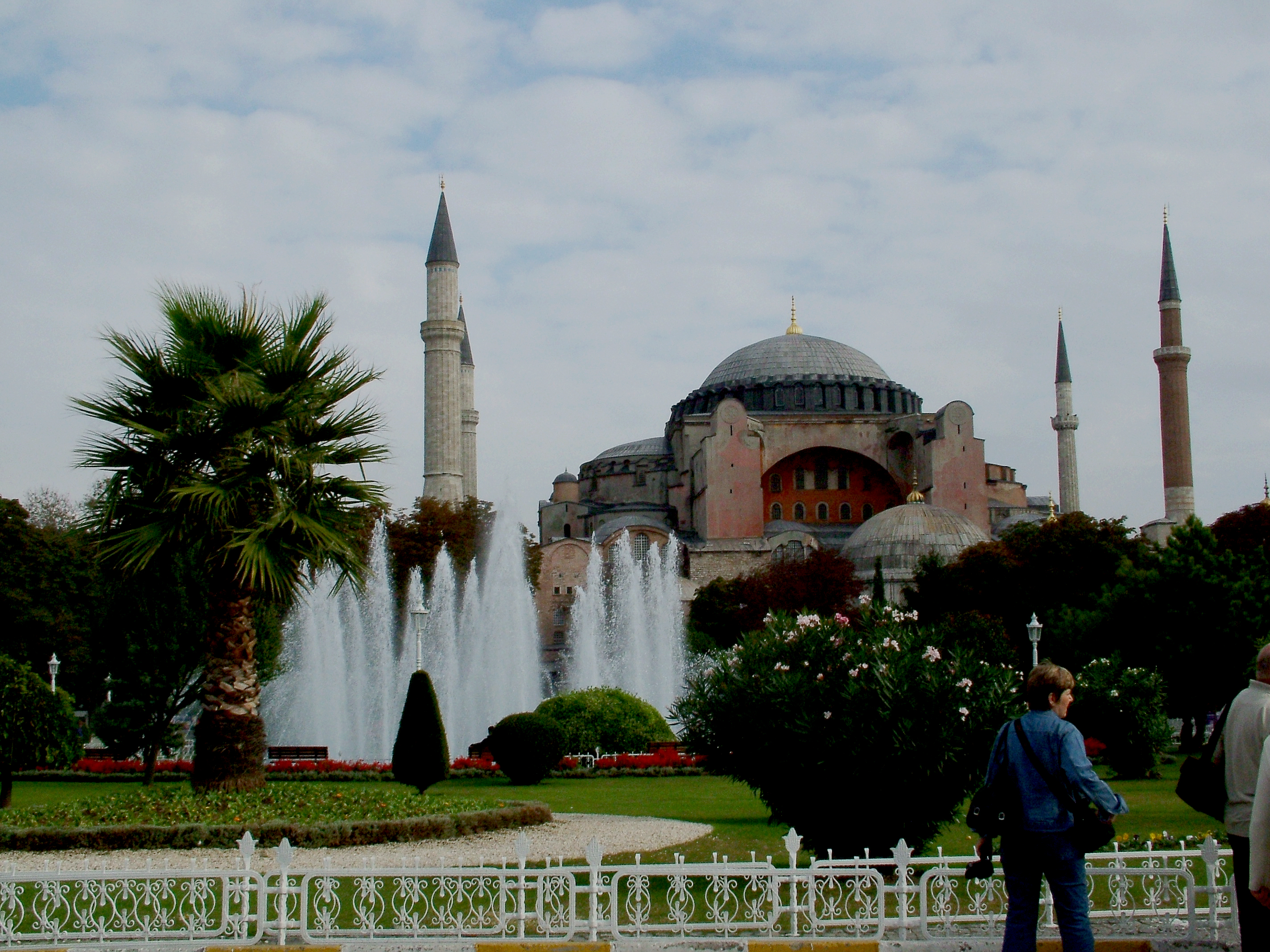 Hagia Szophia-székesegyház (Isztambul, Törökország)